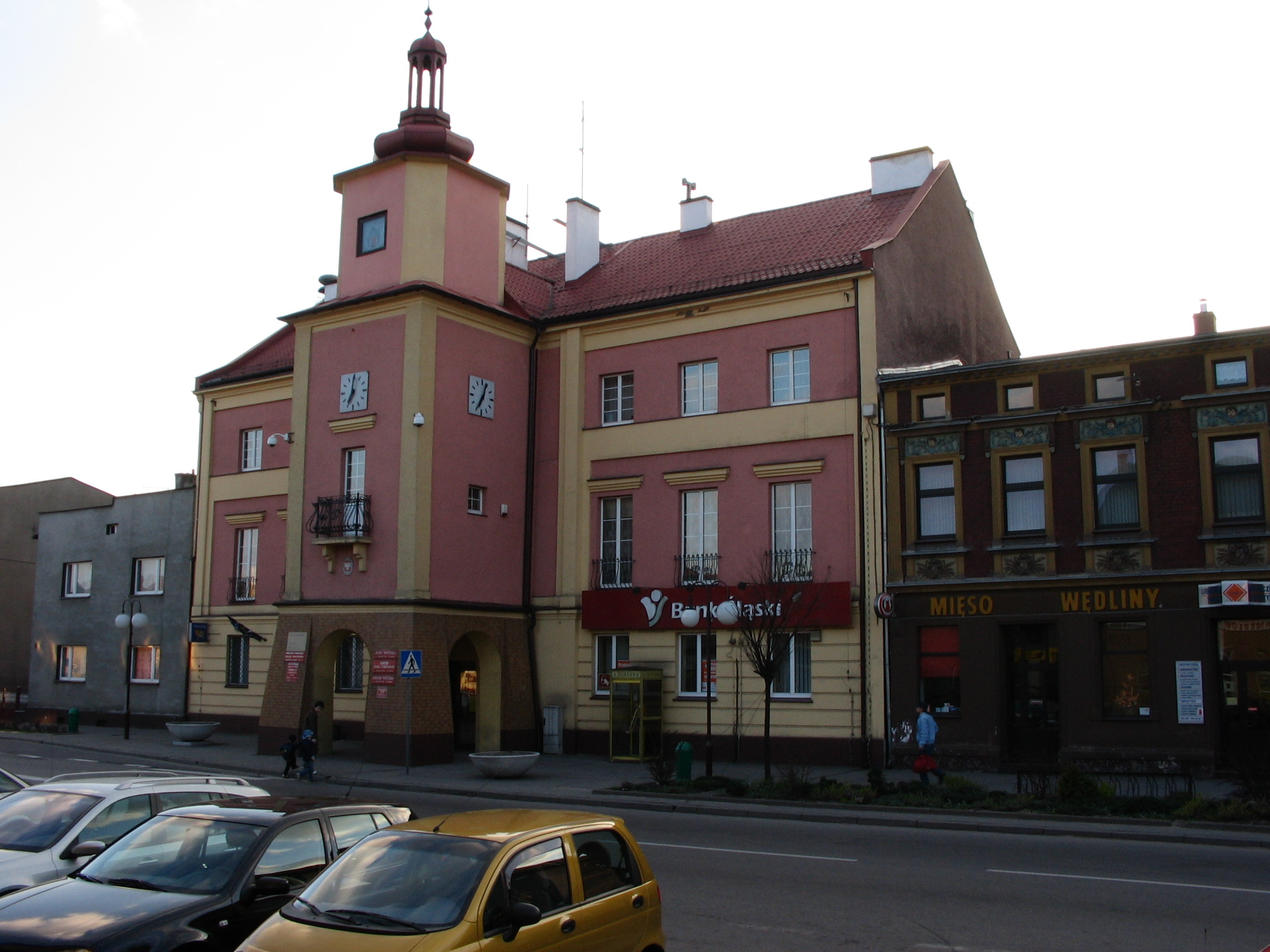 Miasteczko Śląskie - ratusz (powiat tarnogórski)